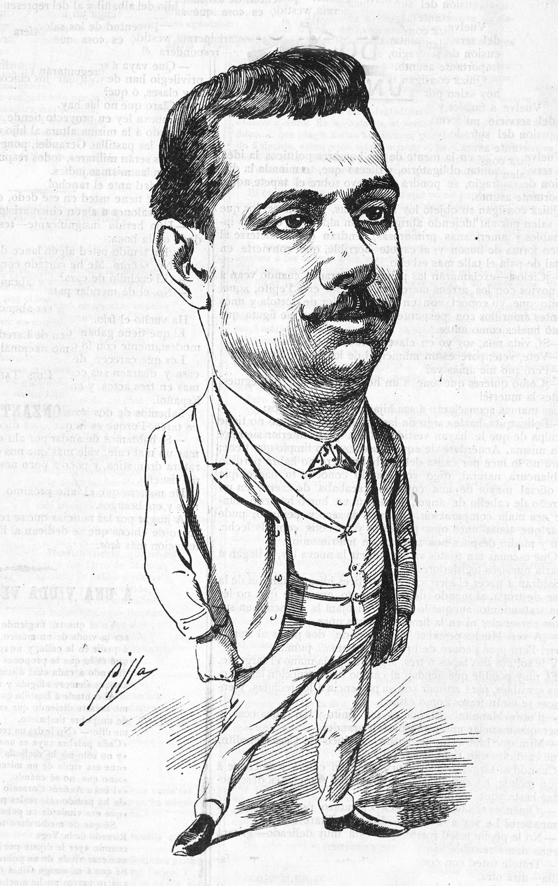 Emilio Mesejo.